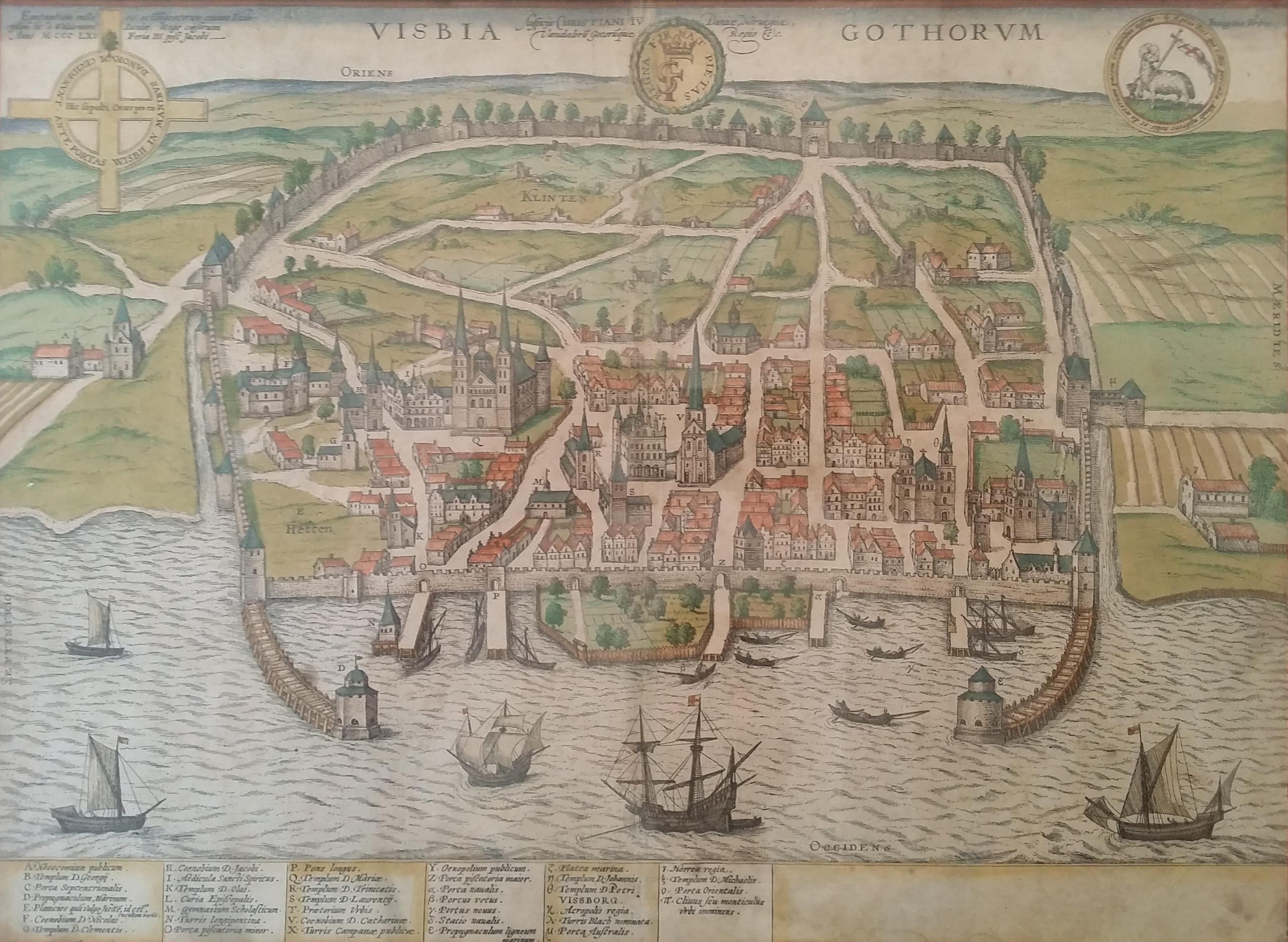 Visby i Slutningen af det 16de Aarhundrede